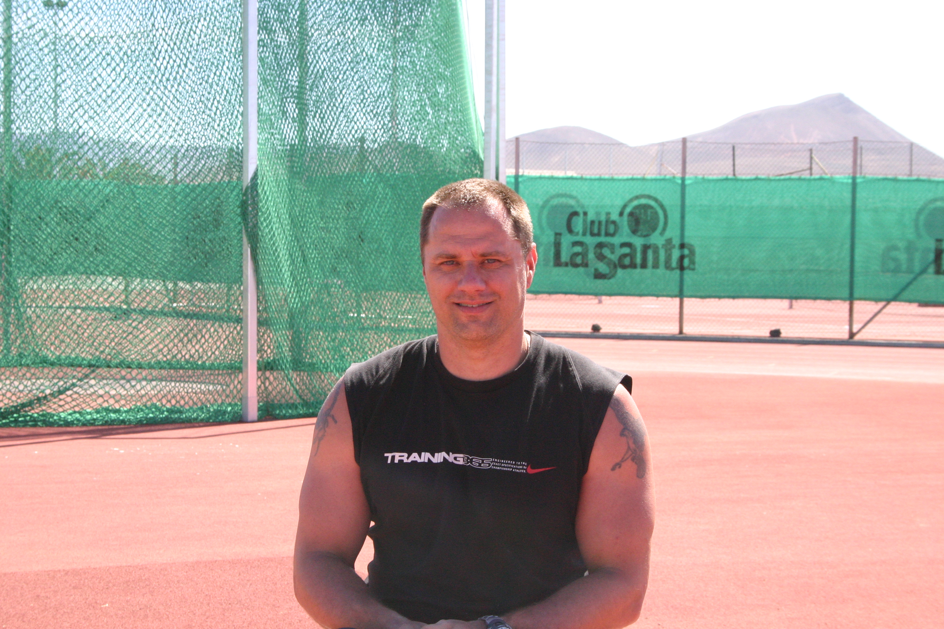 Pieter Gruijters